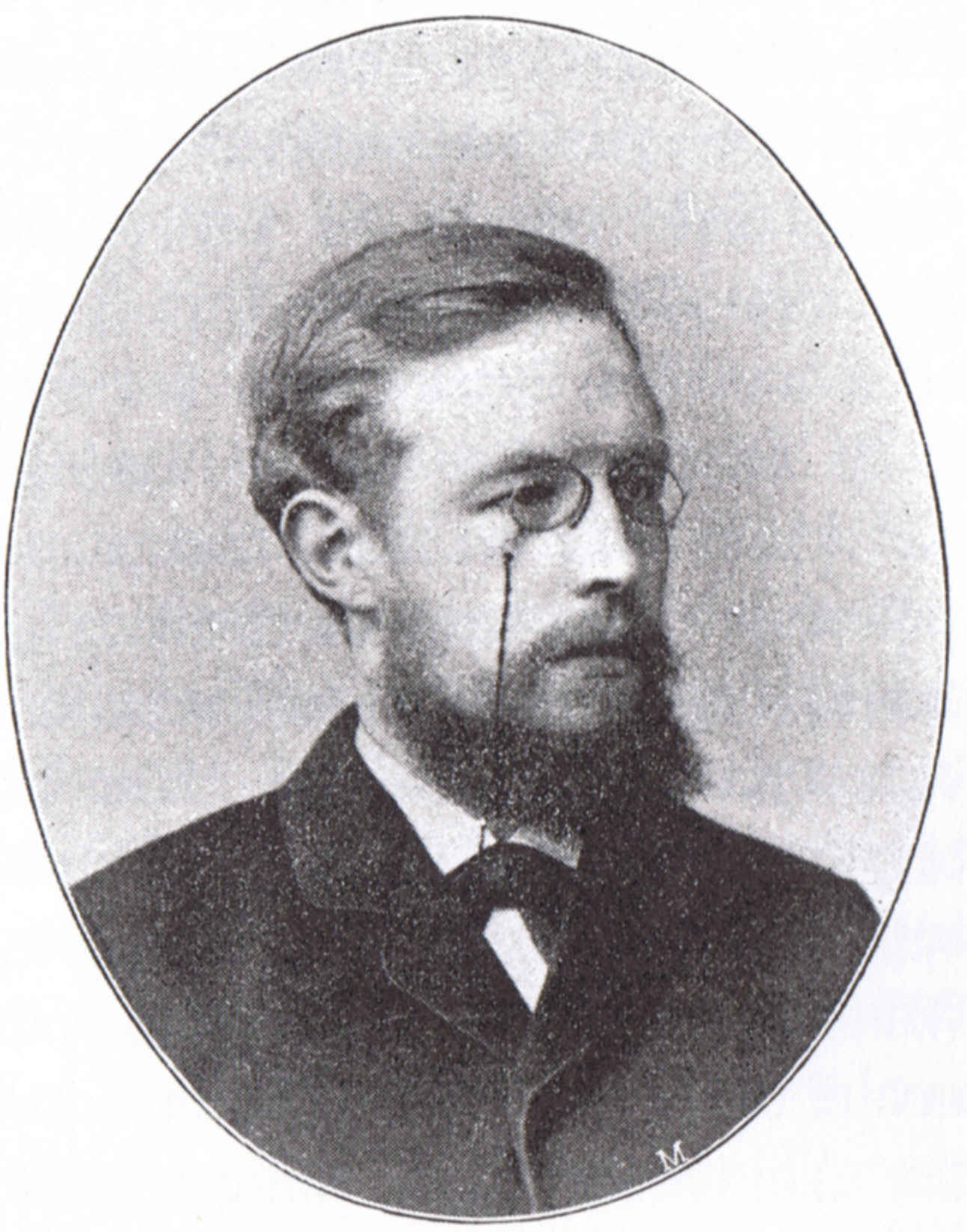 Adolf Bartels (1862-1945), deutscher Dichter, Schriftsteller, Herausgeber, Journalist, Literaturhistoriker und Kulturpolitiker.